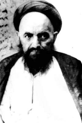 آیت‌الله سید علی قاضی طباطبایی در سن حدوداً 80 سالگی